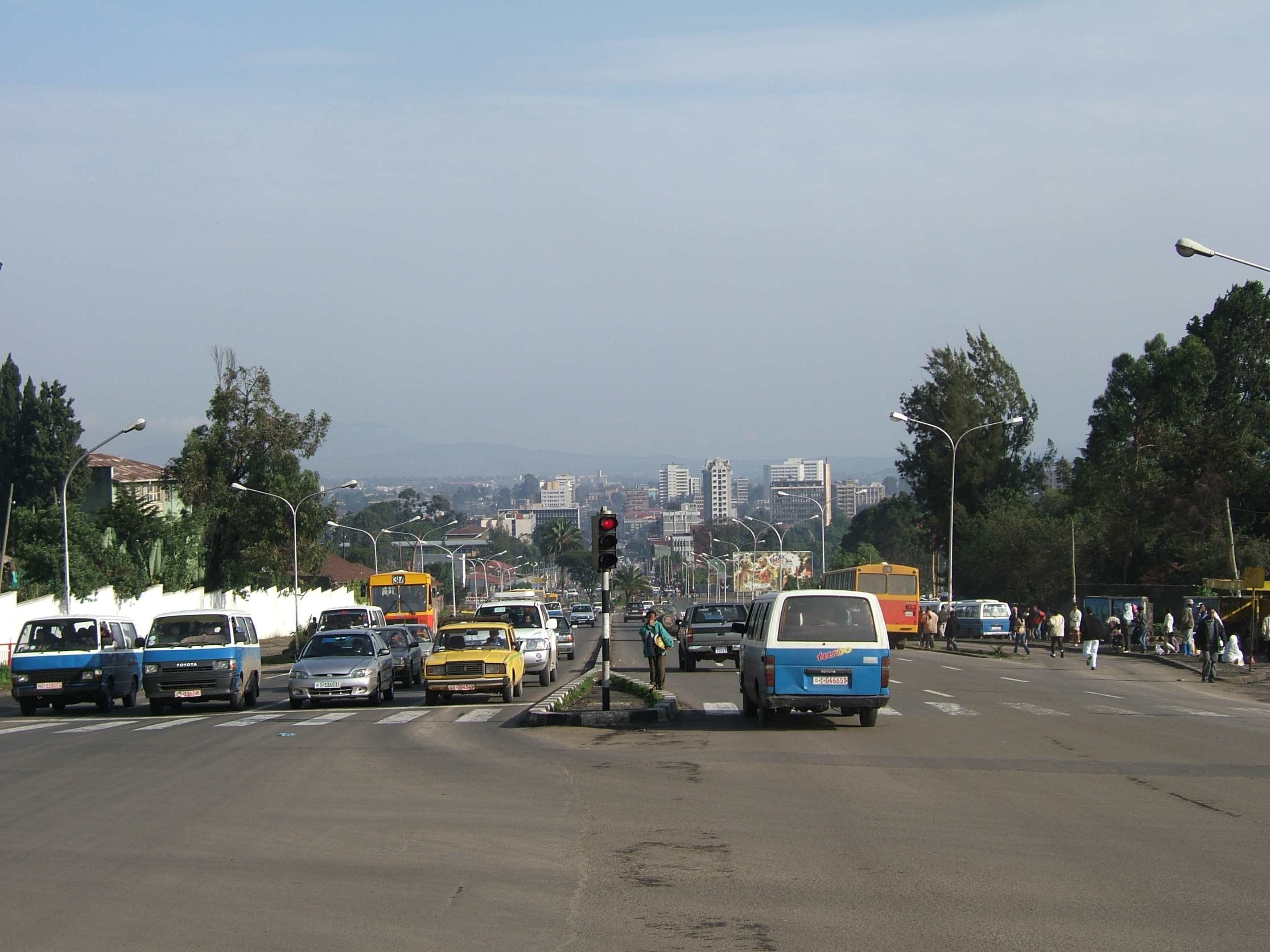 Addis Abeba, Ethiopia.